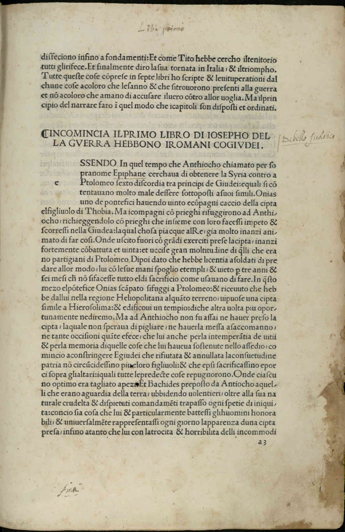 De bello Judaico (italiano). - Impresso in Firenze : per Bartolomeo P., adi 6 di Luglio MCCCCLXXXXIII. - 207 c. ; [*]¹, a-z⁸, &⁸, [-us]⁸, [-rum]⁶ ; fol. .